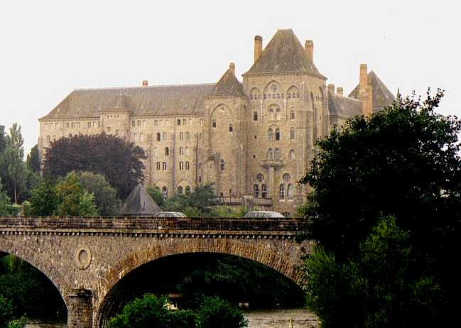 Solemsmes: bâtiment de l'abaye.